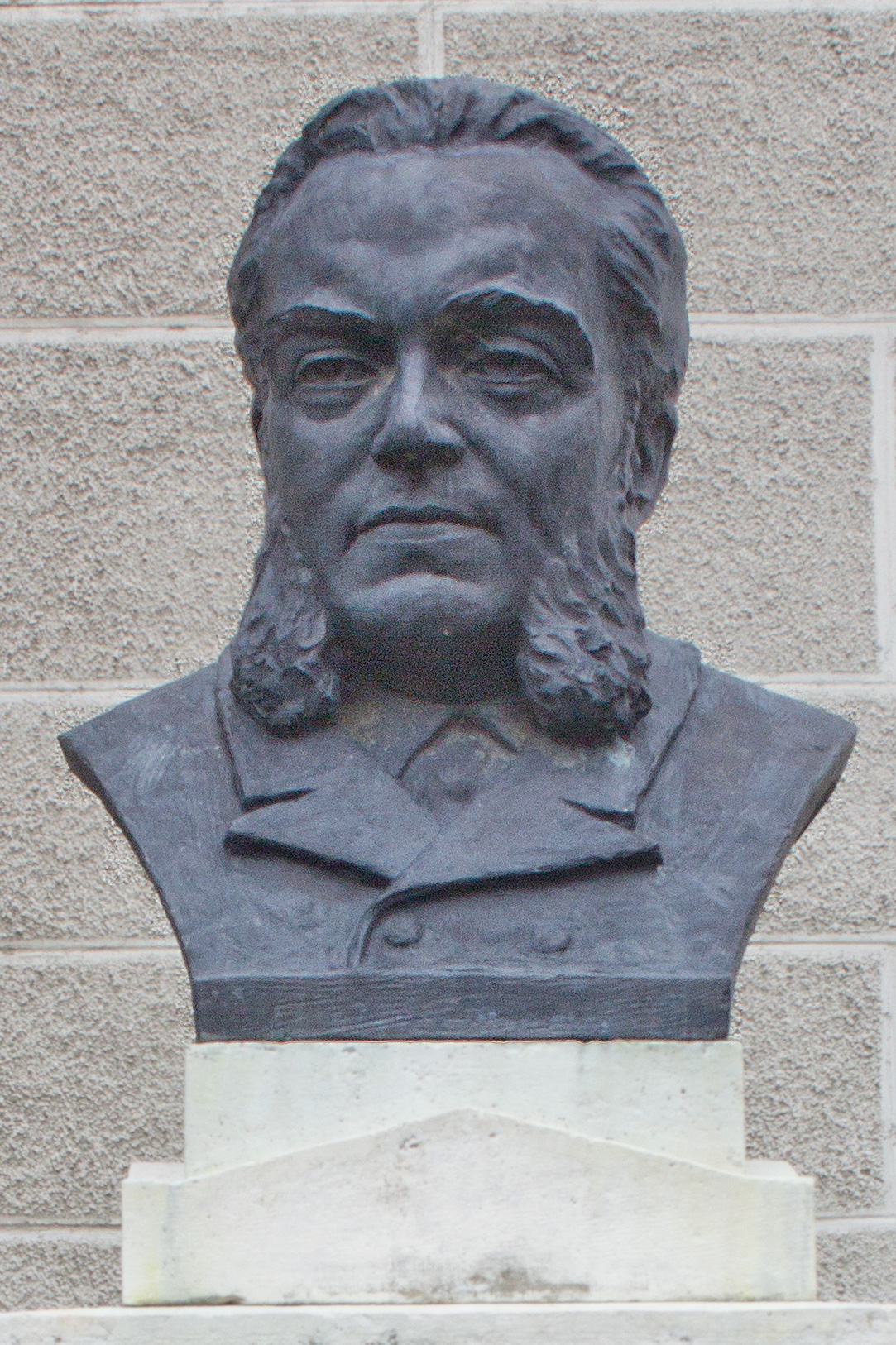 Büste von Alexandru Dimitrie Xenopol (1847-1920) in Arad (Rumänien).